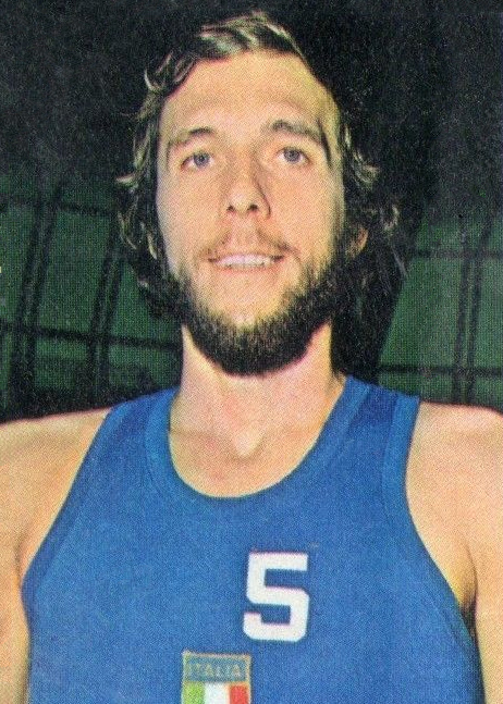 EDIS CALCIATORI 1975/76-Figurina n.342- IELLINI - BASKET -Rec